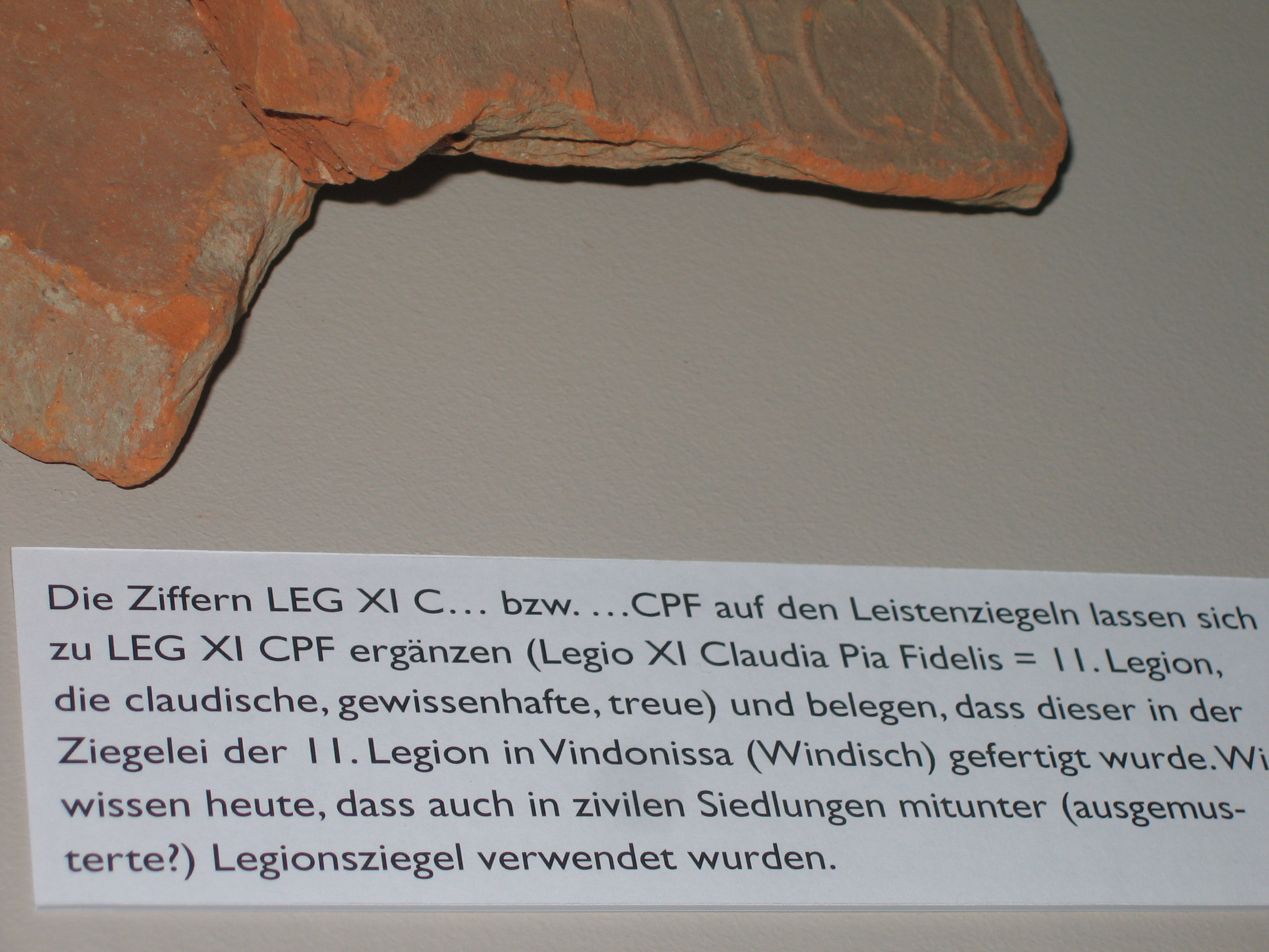 Tonziegel mit Stempel der 11. römischen Legion 'Legio XI Claudia Pia Fidelis'. Fundort: Juliomagus (Schleitheim, Schweiz) Jahr 2000.